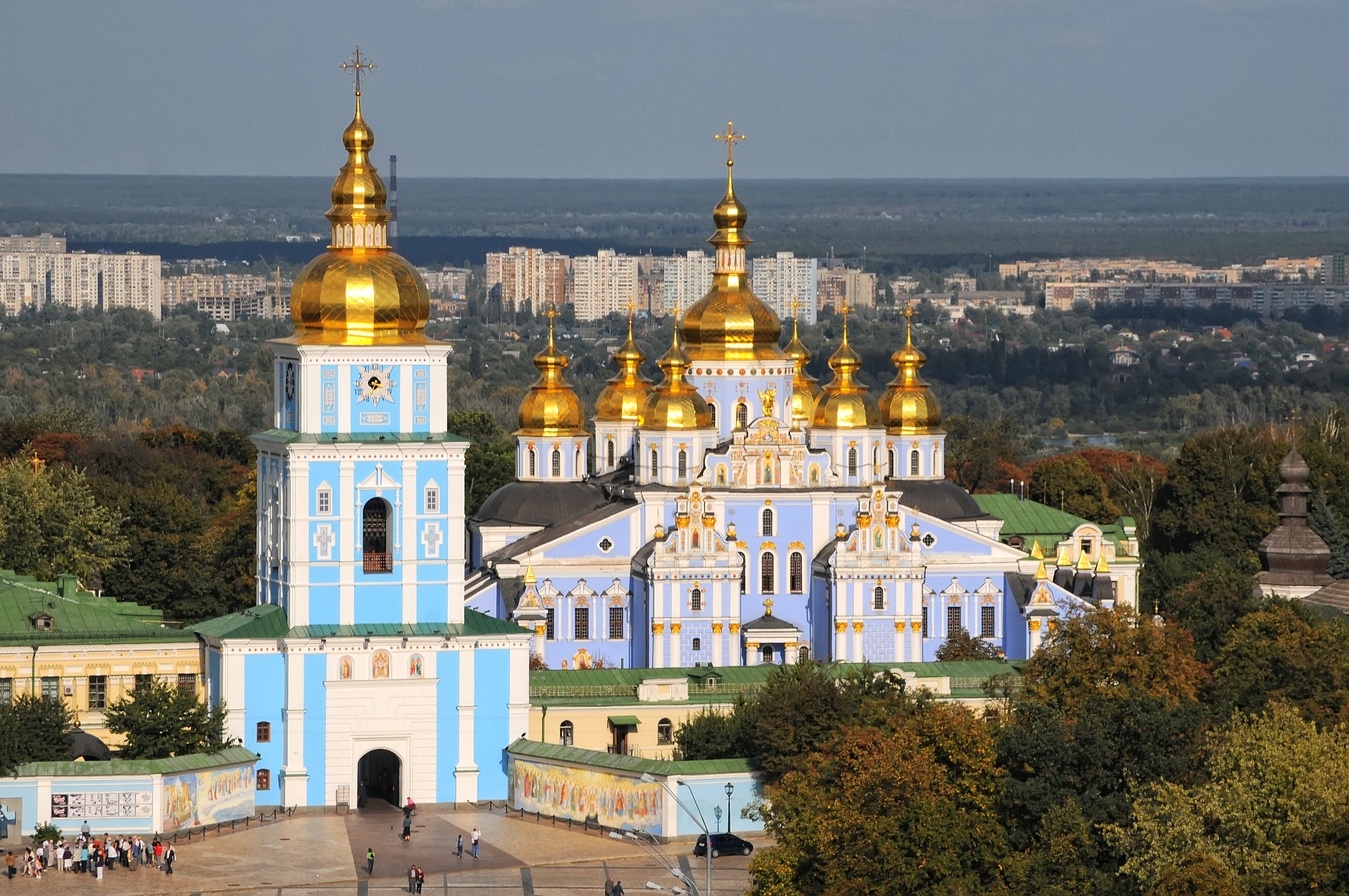 Михайлівський Золотоверхий монастир у Києві.